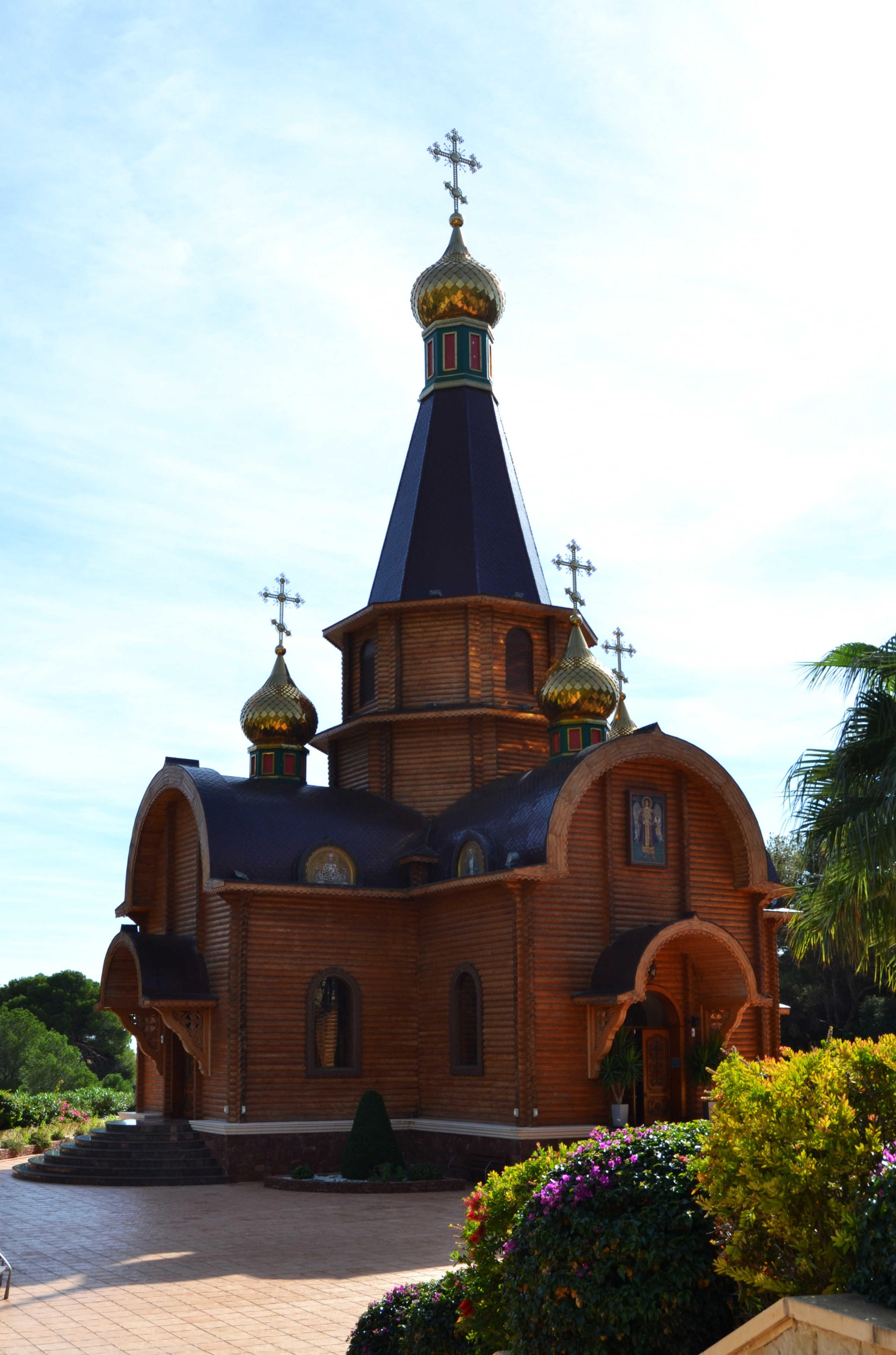 Església ortodoxa de sant Miquel, Altea.